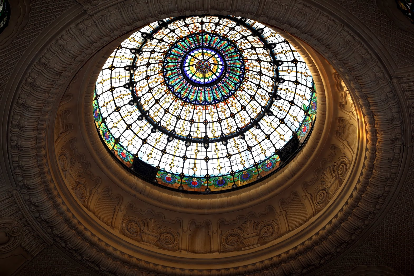 Gellért Fürdő, Budapest